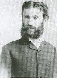 Tauffer Vilmos magyar szülész, nőgyógyász, egyetemi tanár.